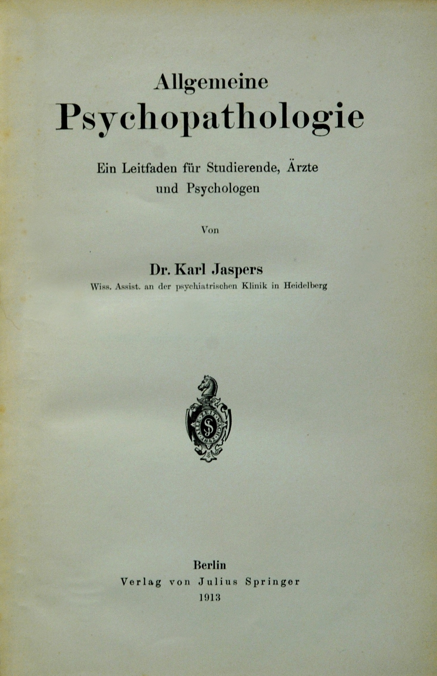 Karl Jaspers (1883 – 1969): Allgemeine Psychopathologie. Ein Leitfaden für Studierende, Ärzte und Psychologen. Berlin: J. Springer 1913. Titlblatt des Erstdrucks